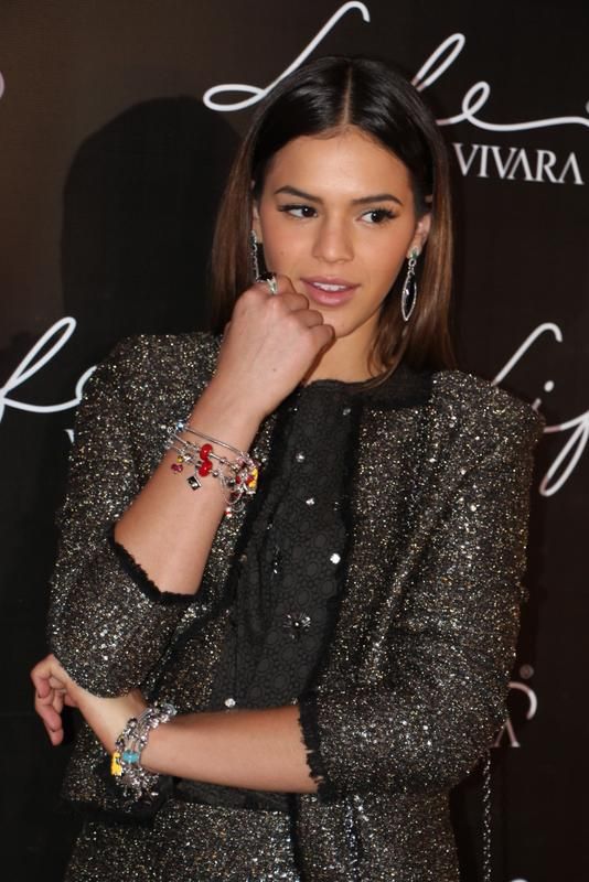 Bruna Marquezine participa de ação da loja Vivara no Shopping JK Iguatemi.